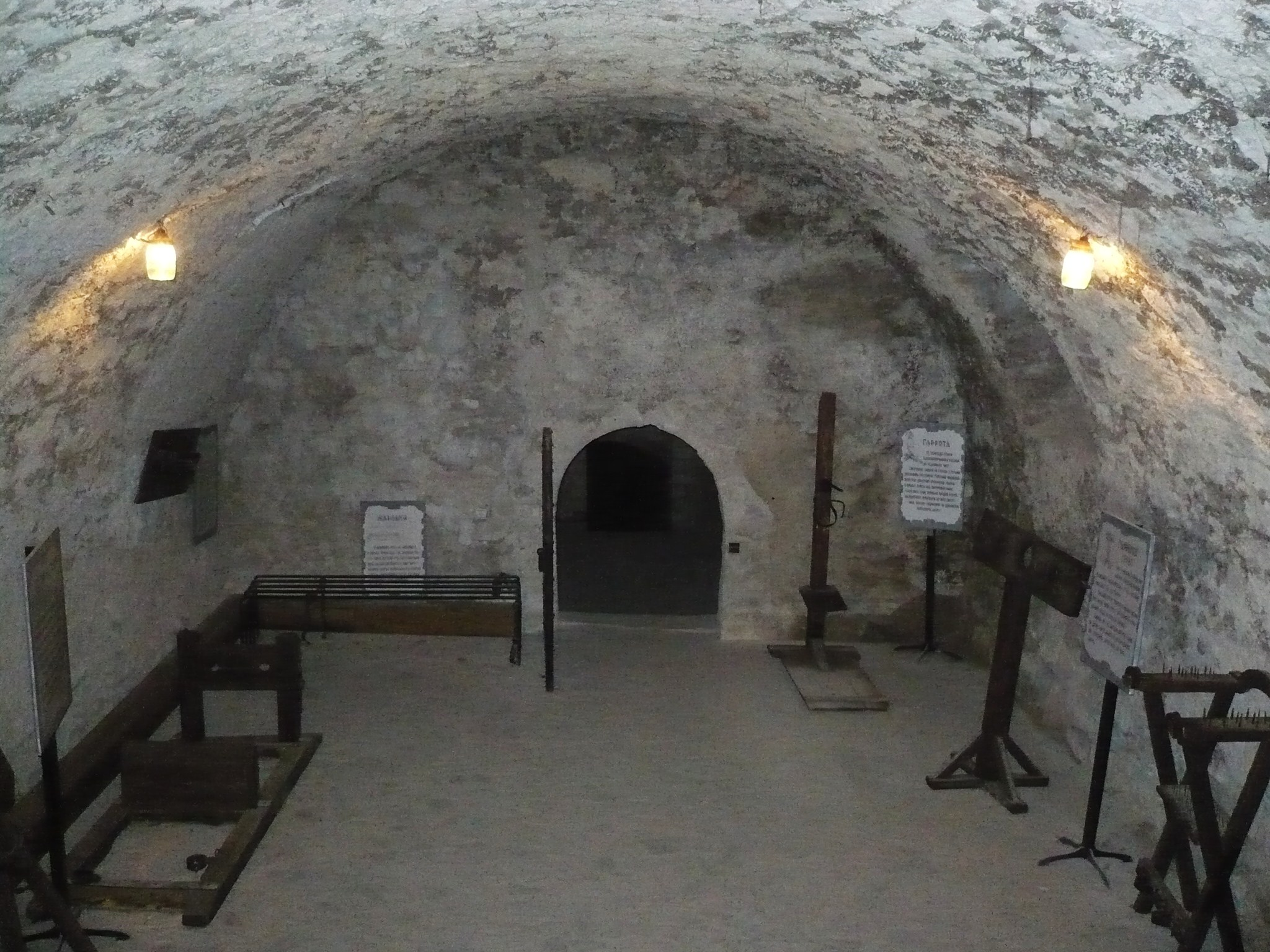 Zbaraż, podziemia zamku